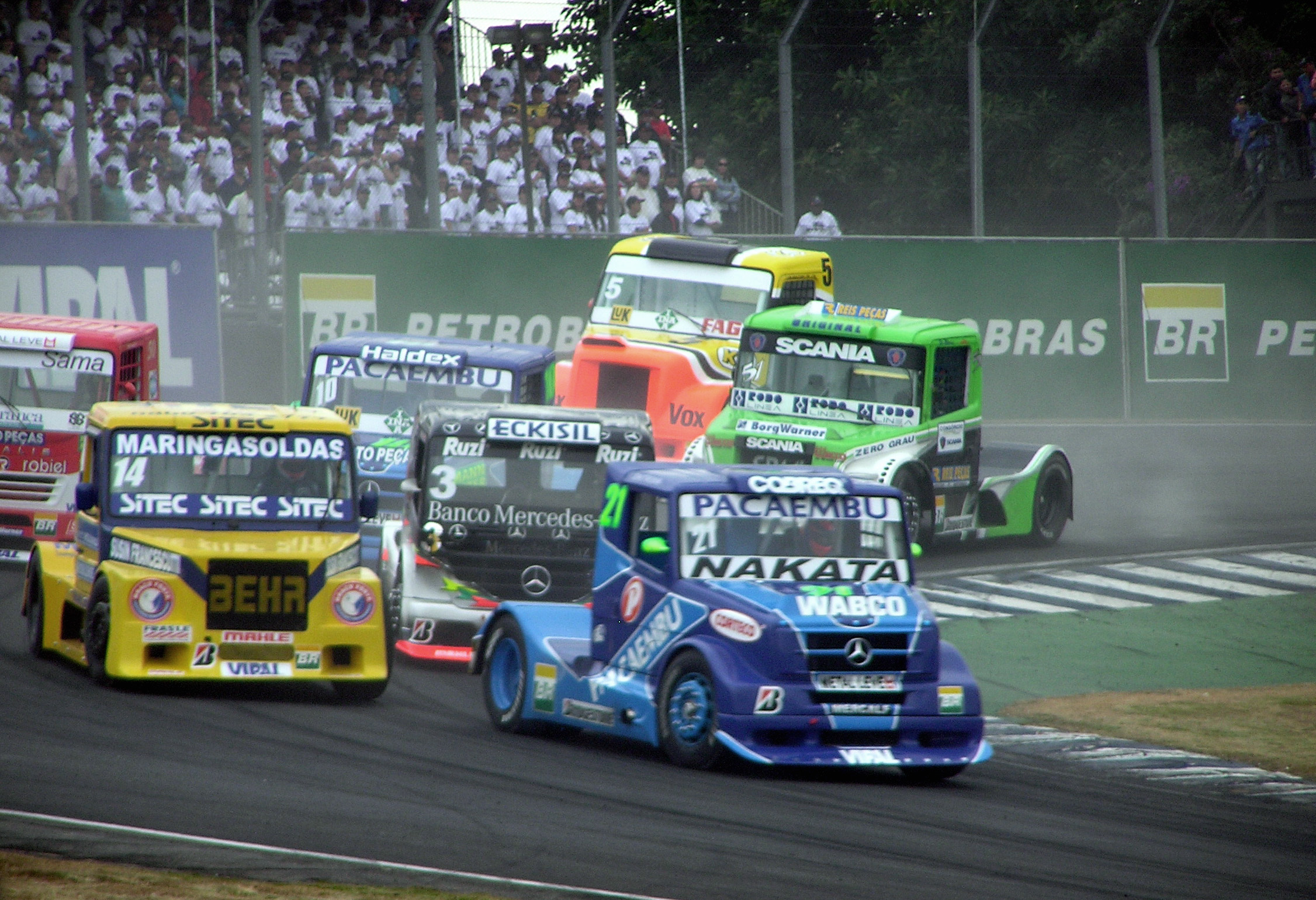 Fórmula Truck 2006 Rd.3 Interlagos: first lap#21 José Cangueiro (Mercedes-Benz)#14 João Maistro (Scania)#3 Geraldo Piquet (Mercedes-Benz)#10 VignaldoFizio (Mercedes-Benz)#50 Fred Marinelli (Iveco) (left end, red truck)#51 José Maria eis (Scania)#5 Fabiano Brito? (Scania)